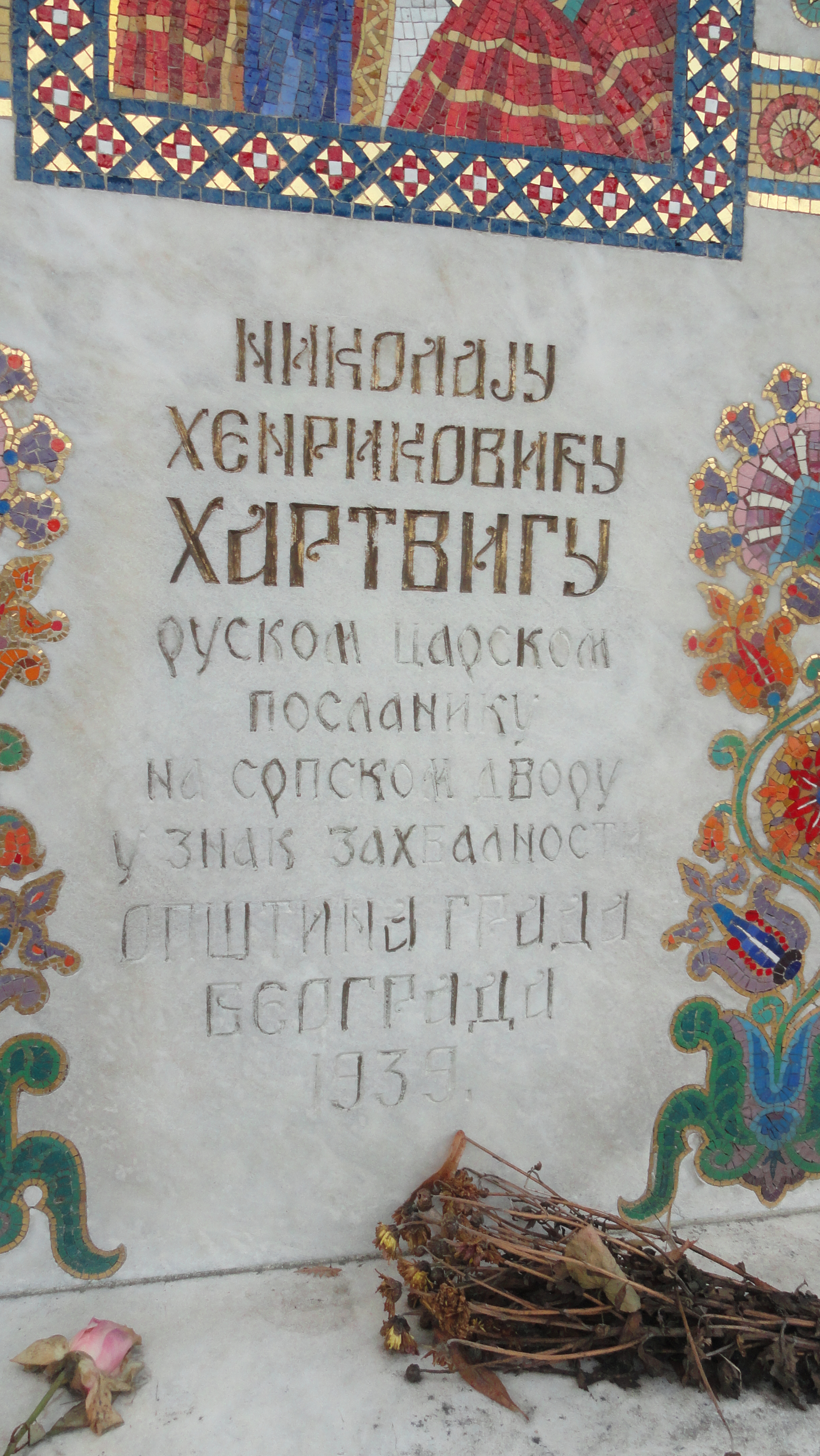 Надпись на могиле Гартвига в Белграде